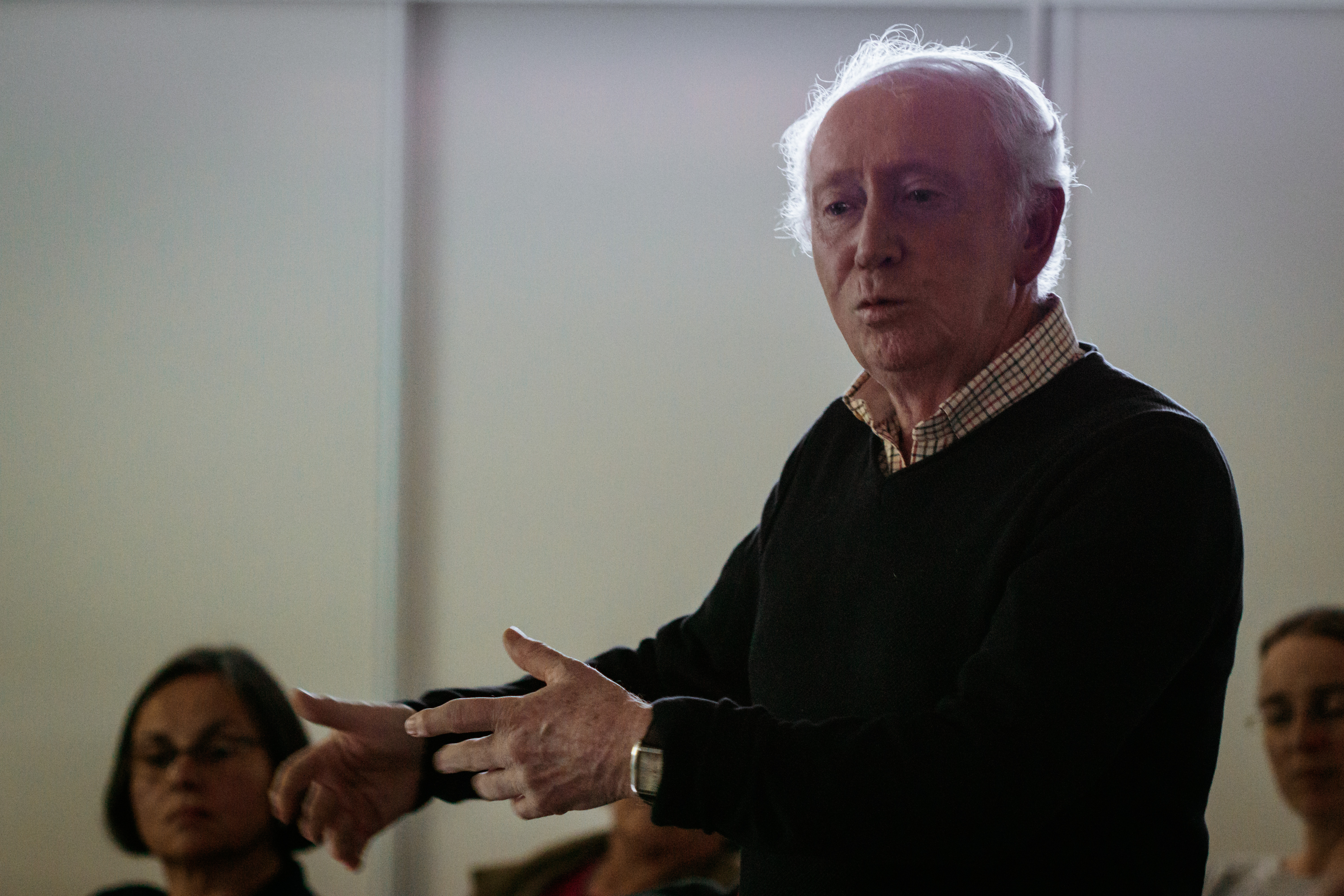 Conférence d'Hervé Lossec à Landerneau dans le cadre des 25 ans du cercle celtique Eskell an Elorn le 3 novembre 2018.